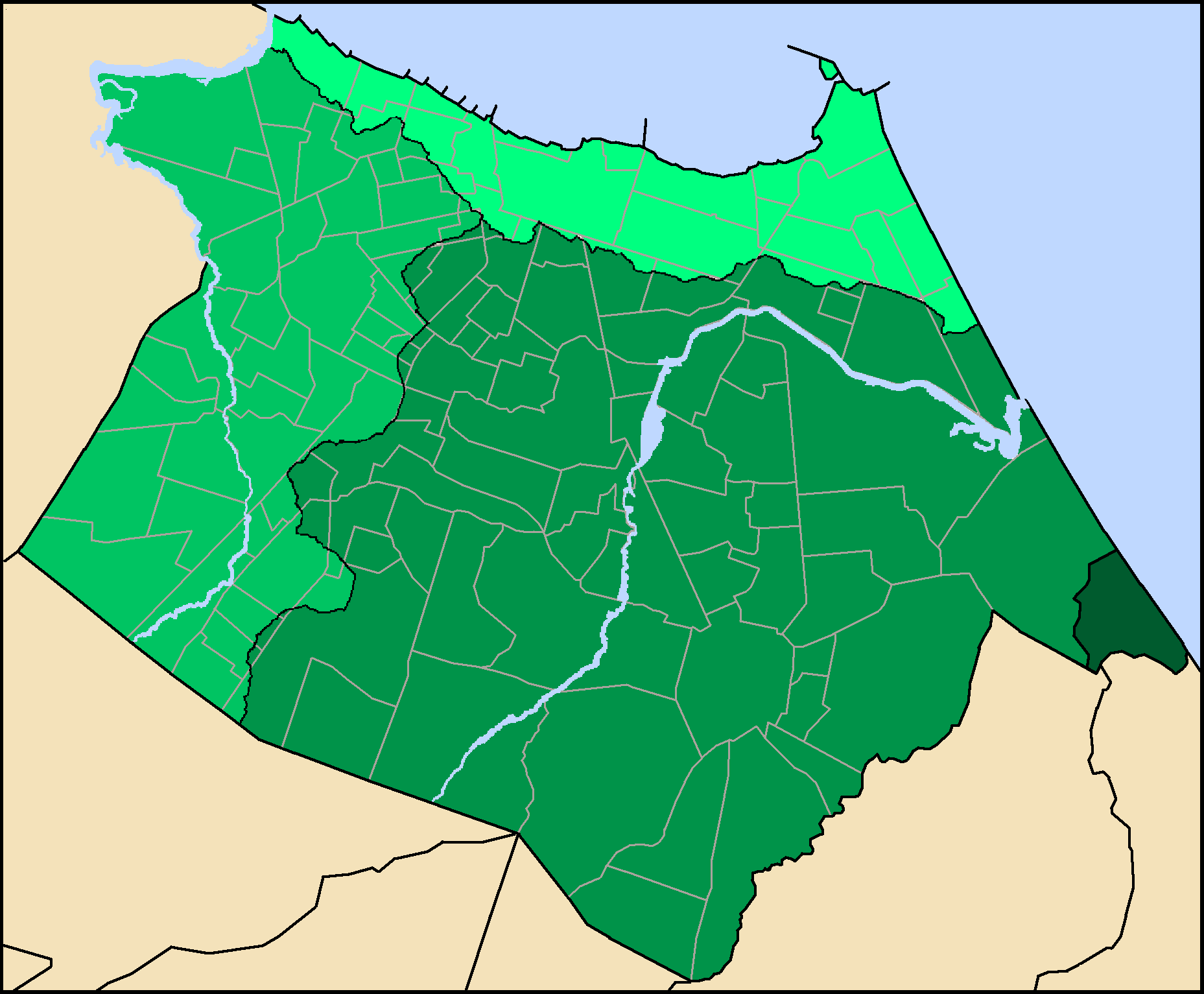 Bacias Hidrográficas de Fortaleza